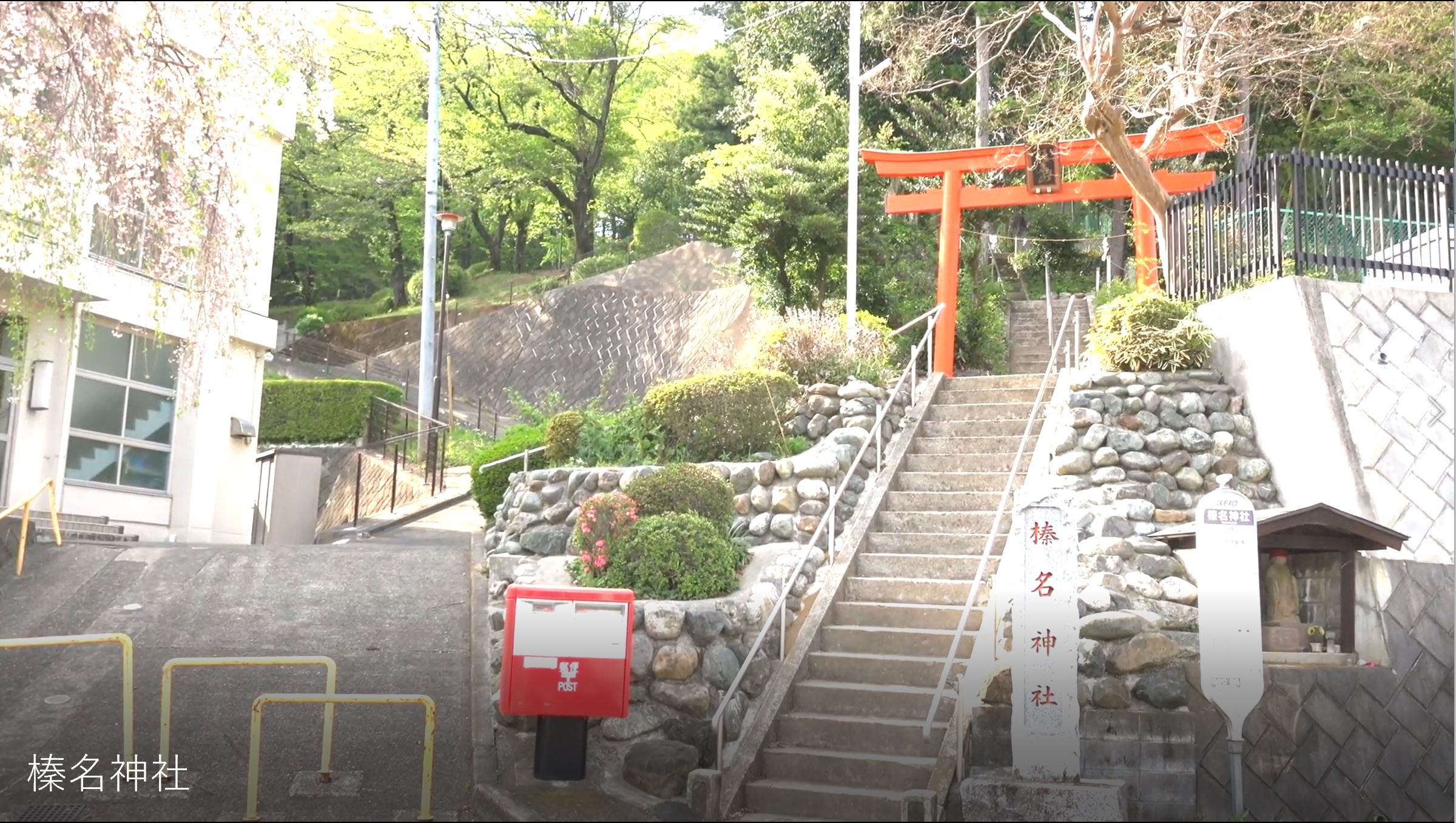 春の例大祭